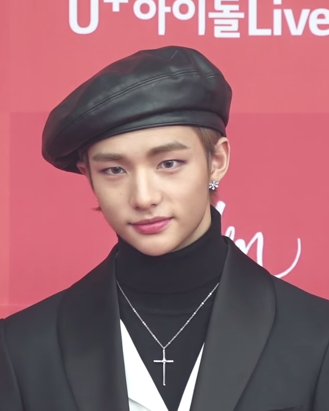 Stray Kids 鉉辰於2019年1月6日在第33屆金唱片獎頒獎典禮